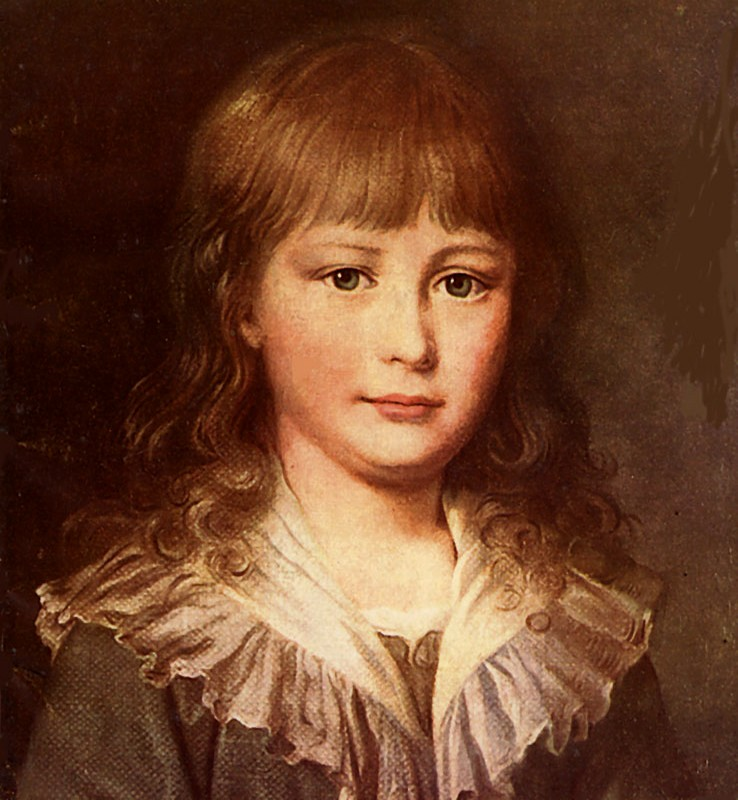 Portrait de Louis XVII en habit de deuil, peintre anonyme (cercle de Jacques-louis David), huile sur toile,1793. Collection particulière de Ulysse Moussali (1899-1987). Informations complémentaires